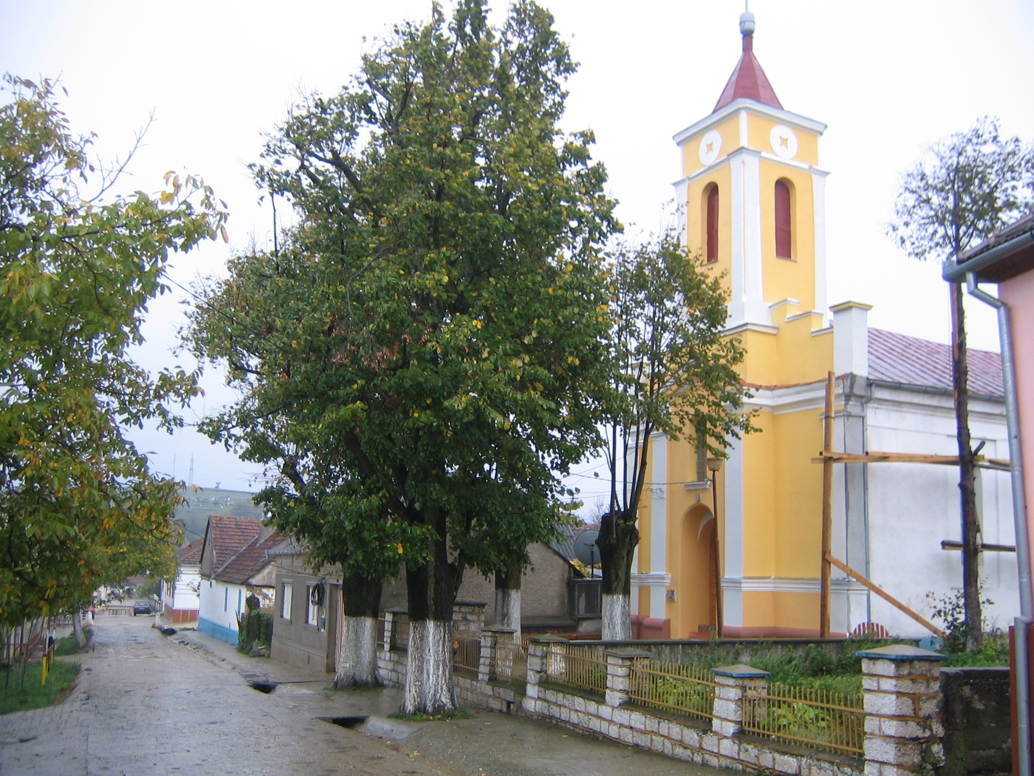 Biserica baptistă (fostă luterană) din Sfânta Elena, județul Caras-Severin